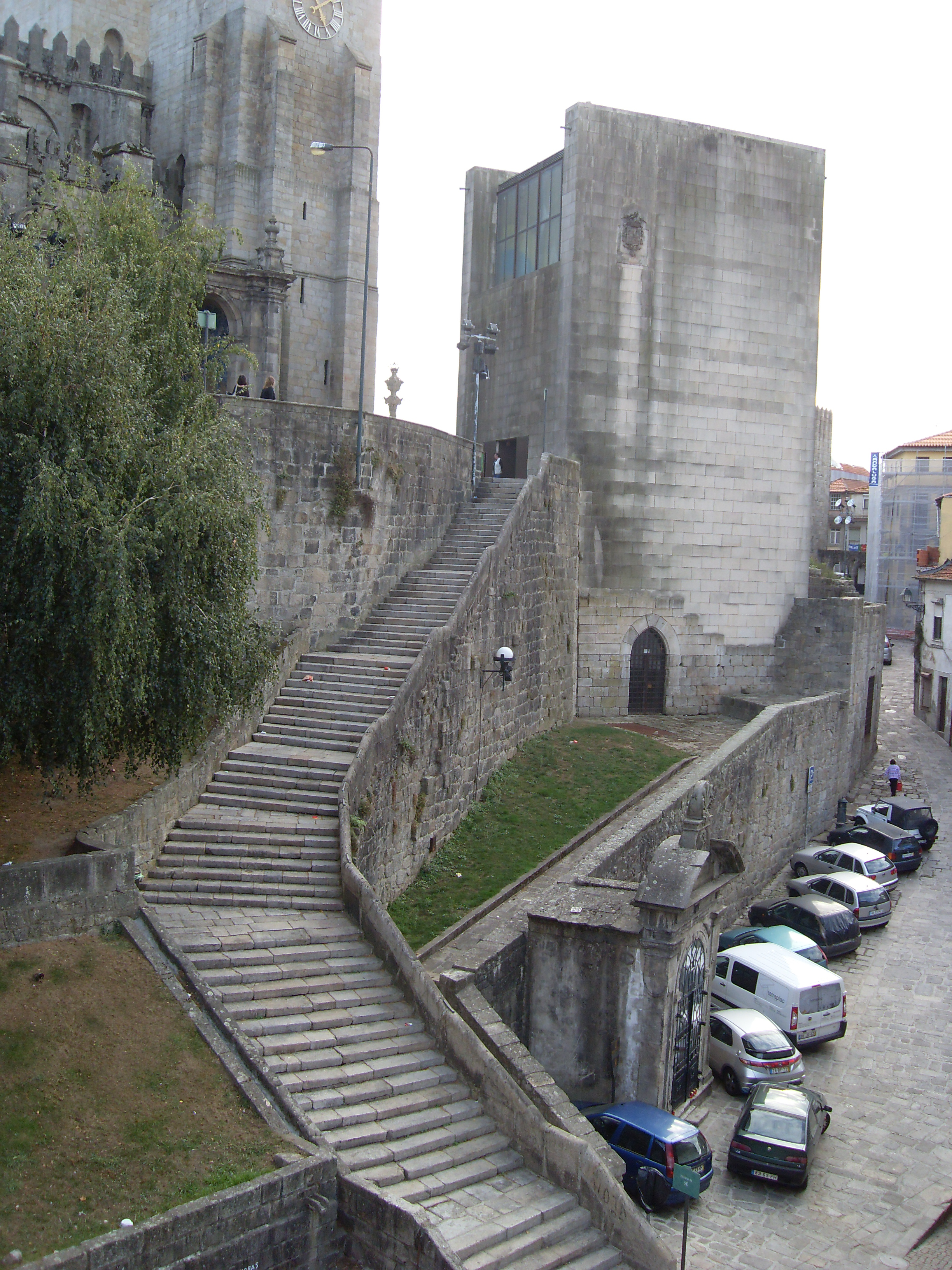 Imagem da Sé do Porto, localizada no Terreiro da Sé, na cidade do Porto, em Portugal.